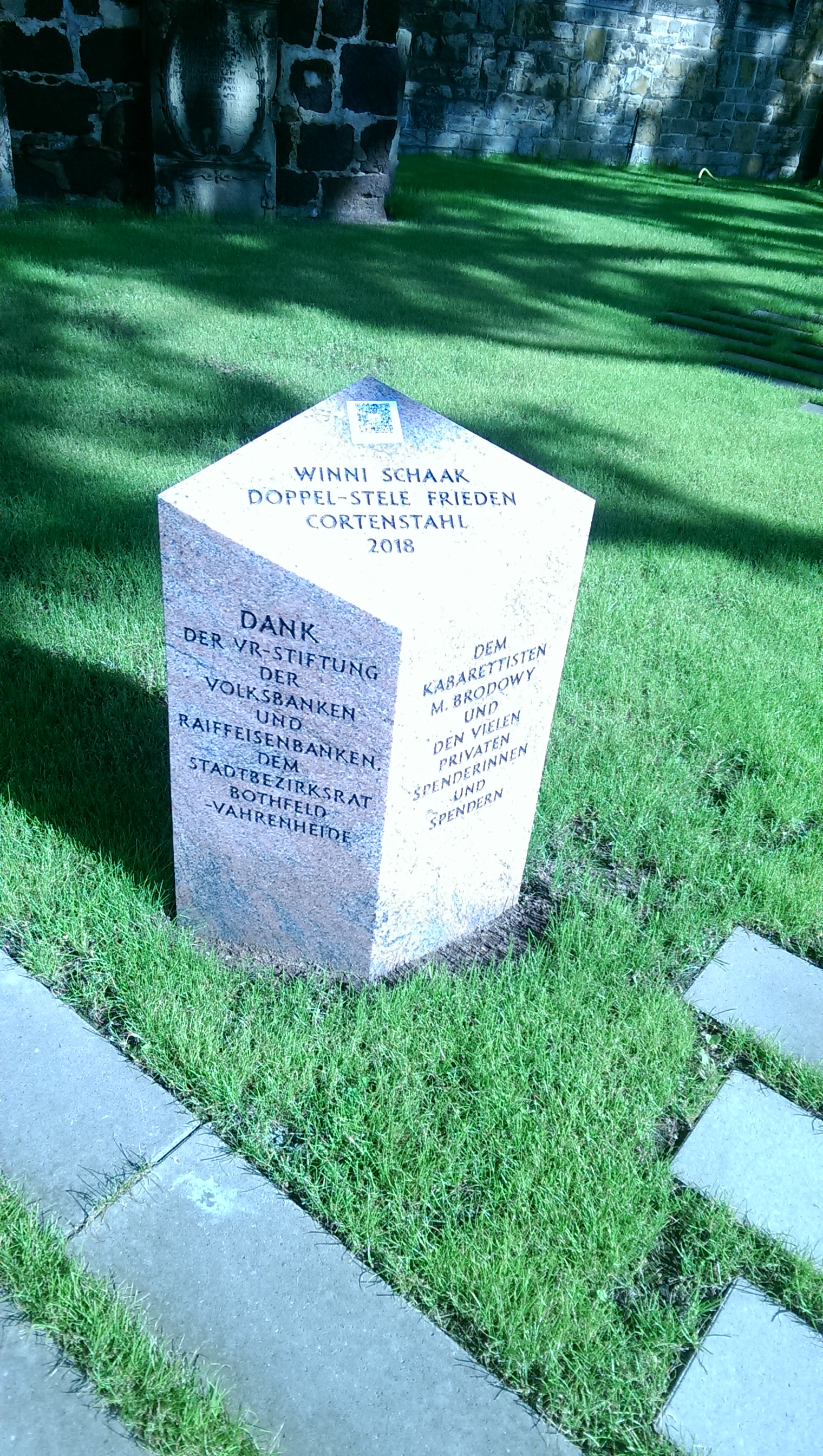 St. Nicolai GehDenkGraten Dankstehle